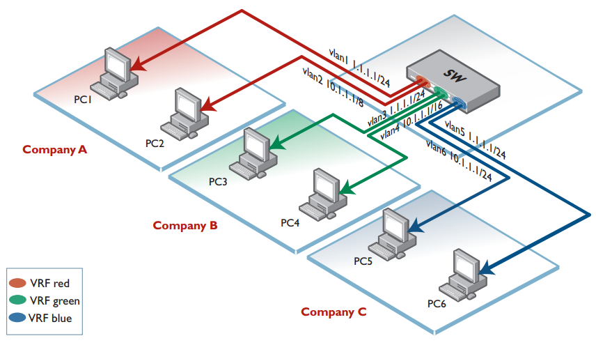 Монгол: зураг-2